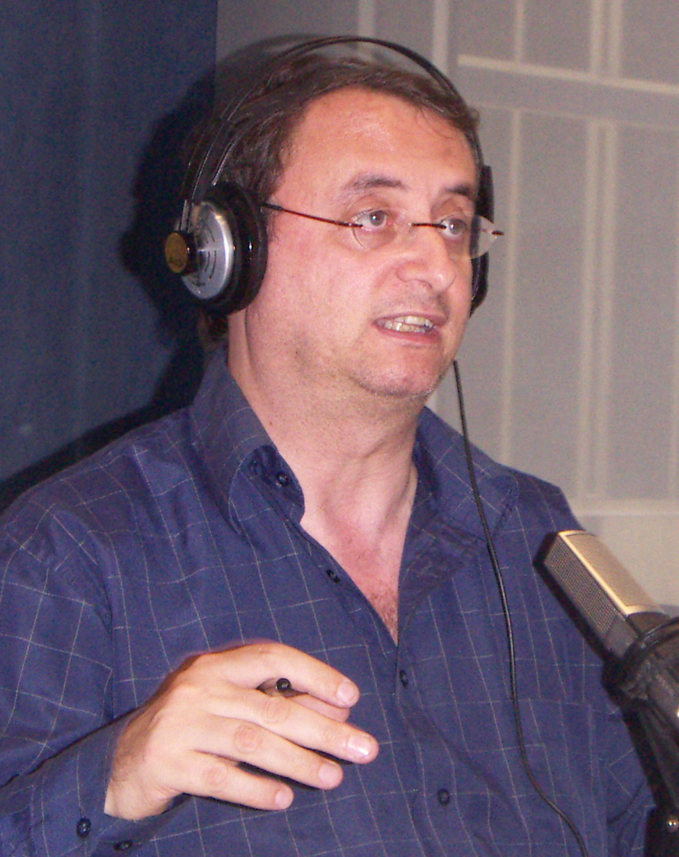 Vicent Partal enregistrant el programa de Catalunya Ràdio l'Infornauta.